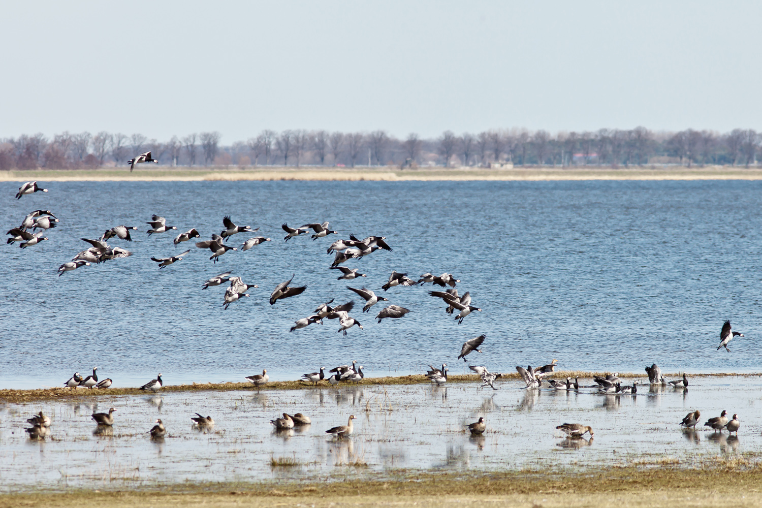 NSG Gülper See. Nonnengänse kamen in riesigen Schärmen, die sich problemlos zu den anderen Vogelarten gesellten.